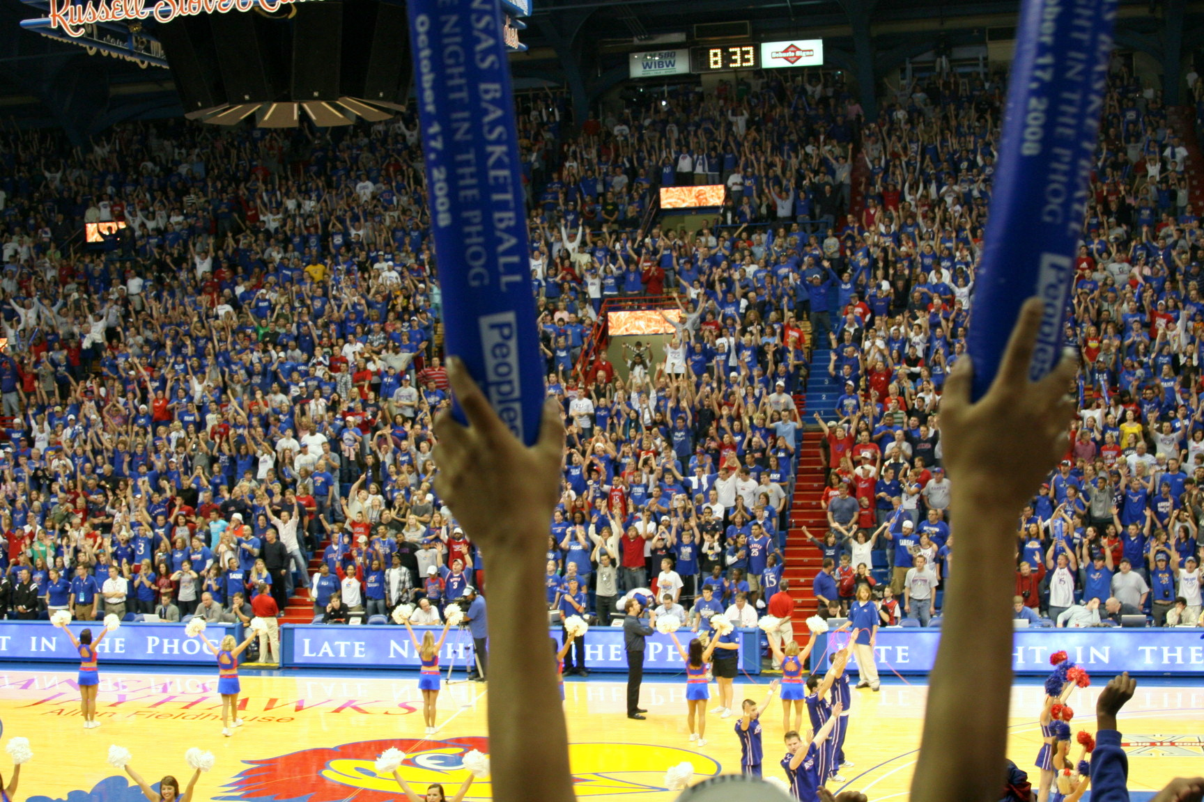 23일 다저 스타디움에서 열린 WBC 결승전 한국과 일본의 경기에서 한인들이 막대 풍선을 두드리며 응원을 하고 있다.